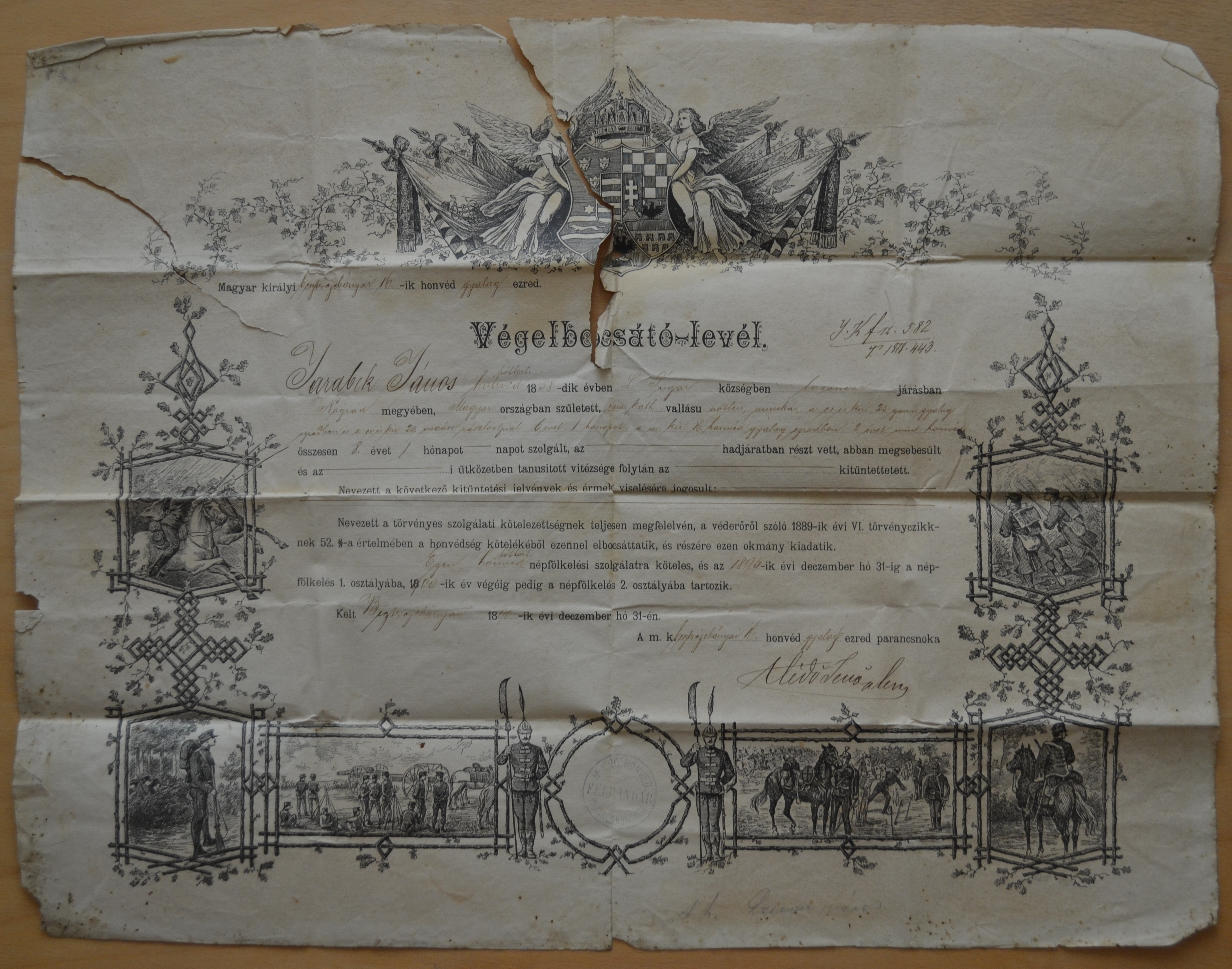 Besztercebánya, végelbocsátó-levél 1890, a katonai szolgálata nyolc évig tartott.